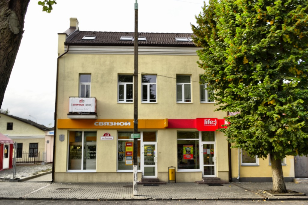 Беларуская (тарашкевіца): Гістарычны цэнтр г. Пінска: будынкі, збудаваньні, планіровачная структура, ландшафт і культурны пласт на тэрыторыі, абмежаванай з захадувул. Чарняхоўскага,з поўначы – вул. Завальнай, па мяжы дваровых тэрыторый дамоў № 1, 7,9, 11, 13, 19, 25, 27 па гэтай вуліцы, вул. Кірава, уключаючы дваровыя тэрыторыі дамоў № 1, 13 па вуліцы Кірава, з усходу – вул. Савецкай, у тым ліку дома № 5 па вул. Іркуцка-Пінскай Дывізіі, дома № 2 па вул. Кулікова, дома № 3 на пл. Кастрычніка, памяжы дваровых тэрыторый забудовы няцотнага боку дамоў № 1, 3па вул. Кіеўскай, да перакрыжаваньняз вул. Альхоўскіх, ад перакрыжаваньня з вул. Дняпроўскай Флятыліі,па вул. Дняпроўскай Флятыліі, уключаючы дваровыя тэрыторыі дамоў№ 39, 41 гэтай вуліцы, з поўдня —левым берагам р. Піна да перасячэньня з вул. Чарняхоўскага. г. Пінск This is a photo of Belarusian heritage monument. Reference number: 112Е000529 ( WLM)